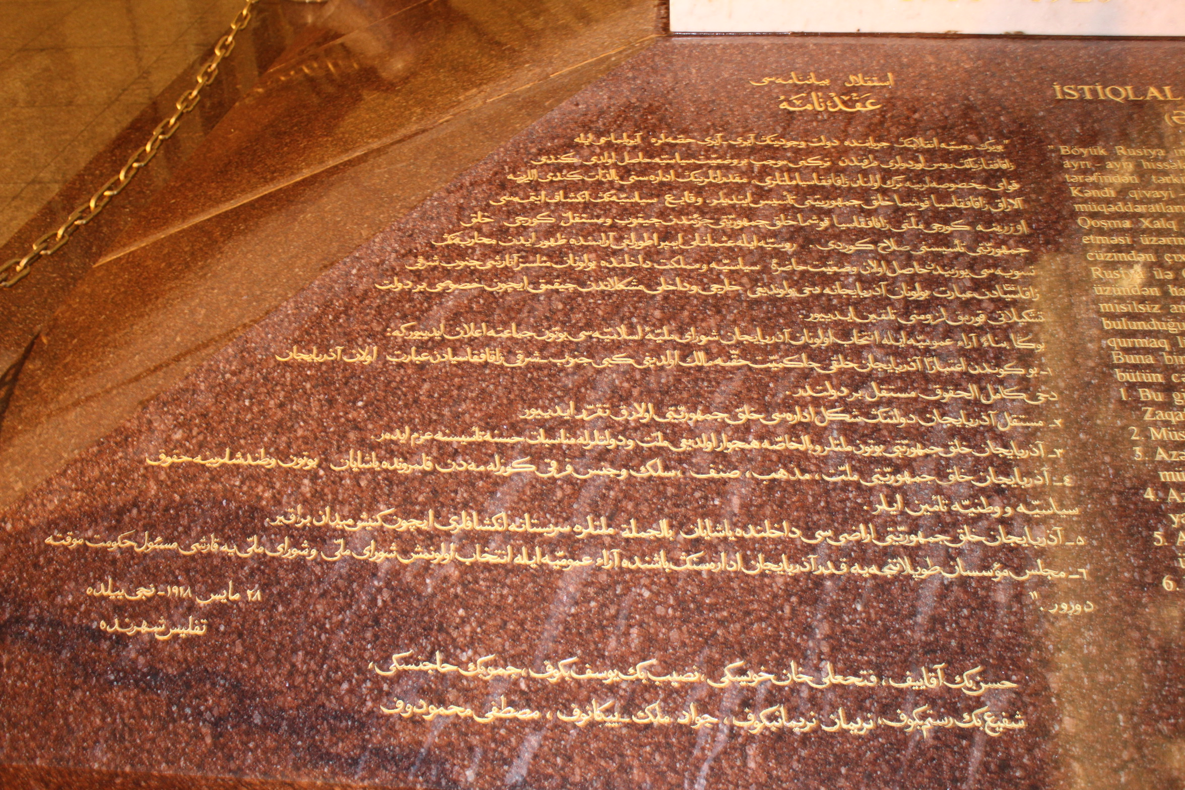 Декларация о независимости Азербайджана, фарсидский алфавит. Азербайджанский язык.